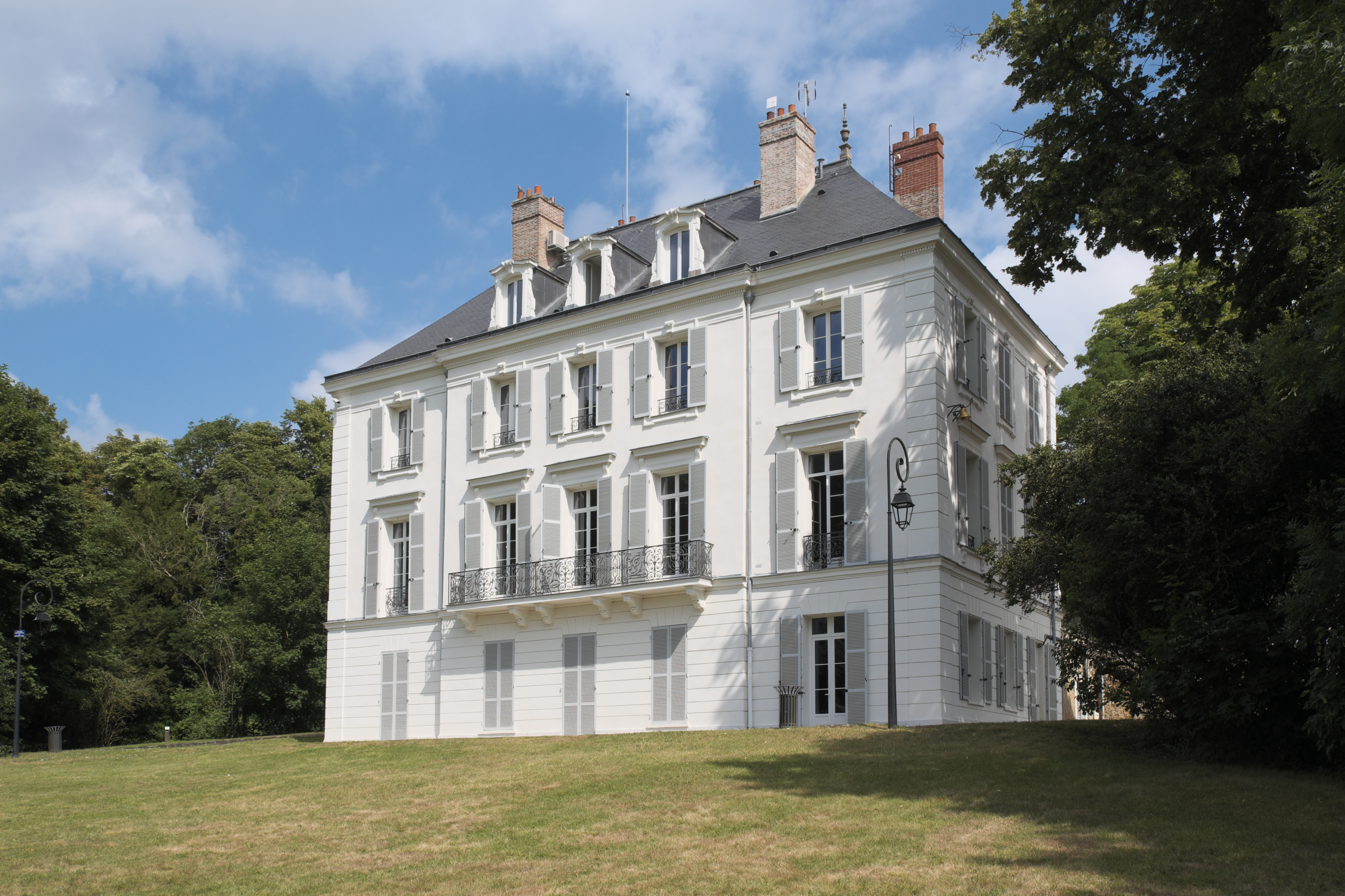 Rathaus (Mairie) in Boussy-Saint-Antoine im Département Essonne (Île-de-France/Frankreich)